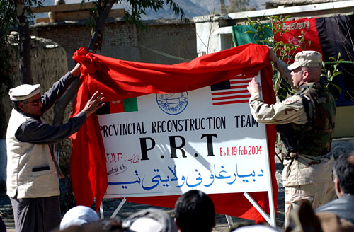 Lt. Col. Alan Maskal, the Asadabad Parwan Provinial Reconstruction Team commander, and Eastern Region Governor Sayed Fazel Akbar unveil the sign of the Provincial Reconstruction Team at the Civil Military Operations Center, Feb. 19, 2004, during its grand opening in downtown Asadabad, Afghanistan.